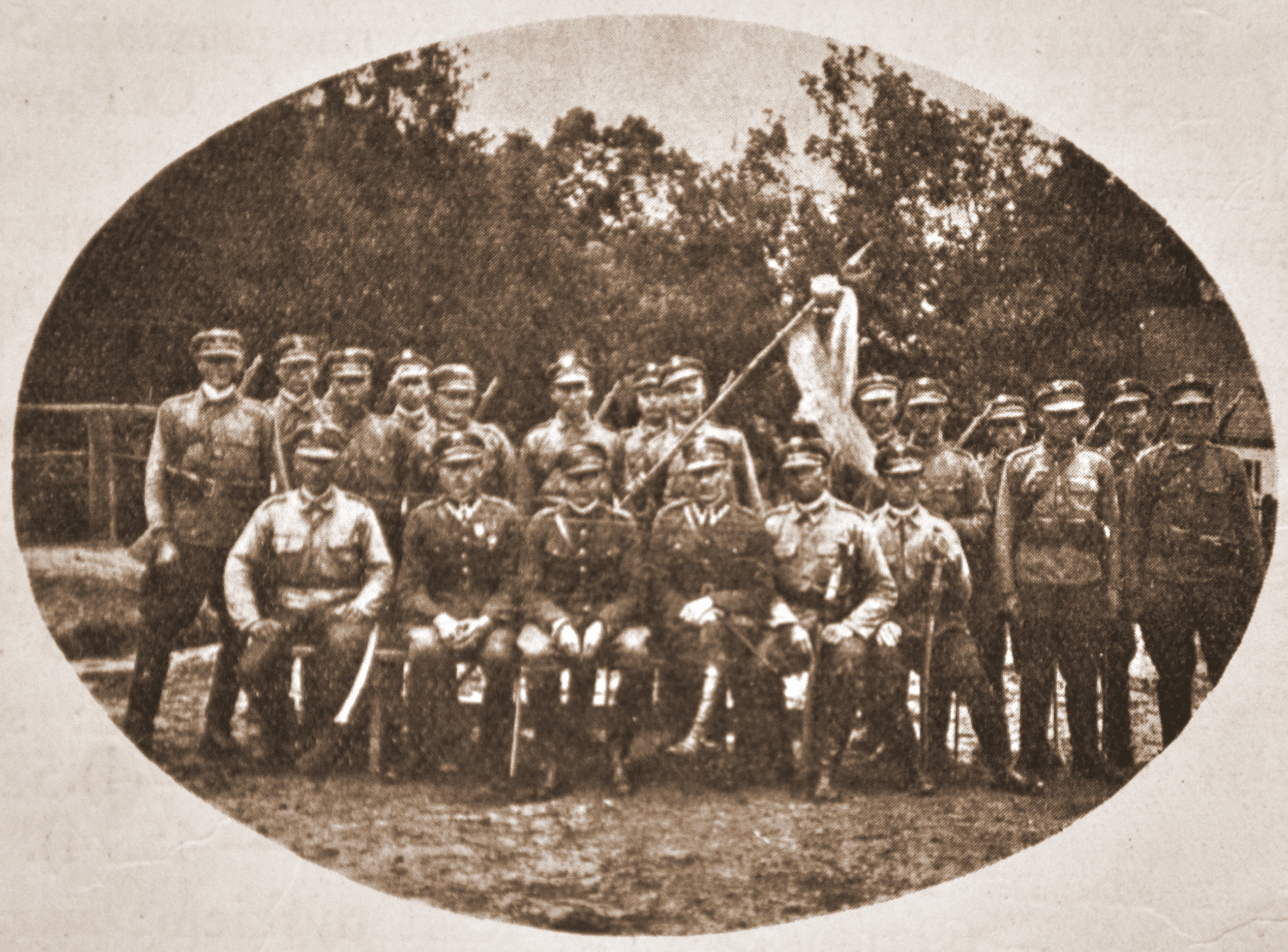 Oryginalny podpis pod zdjęciem: Pluton 11 szwadronu, który zdobył buńczuk w zawodach szwadronów 1 Brygady KOP